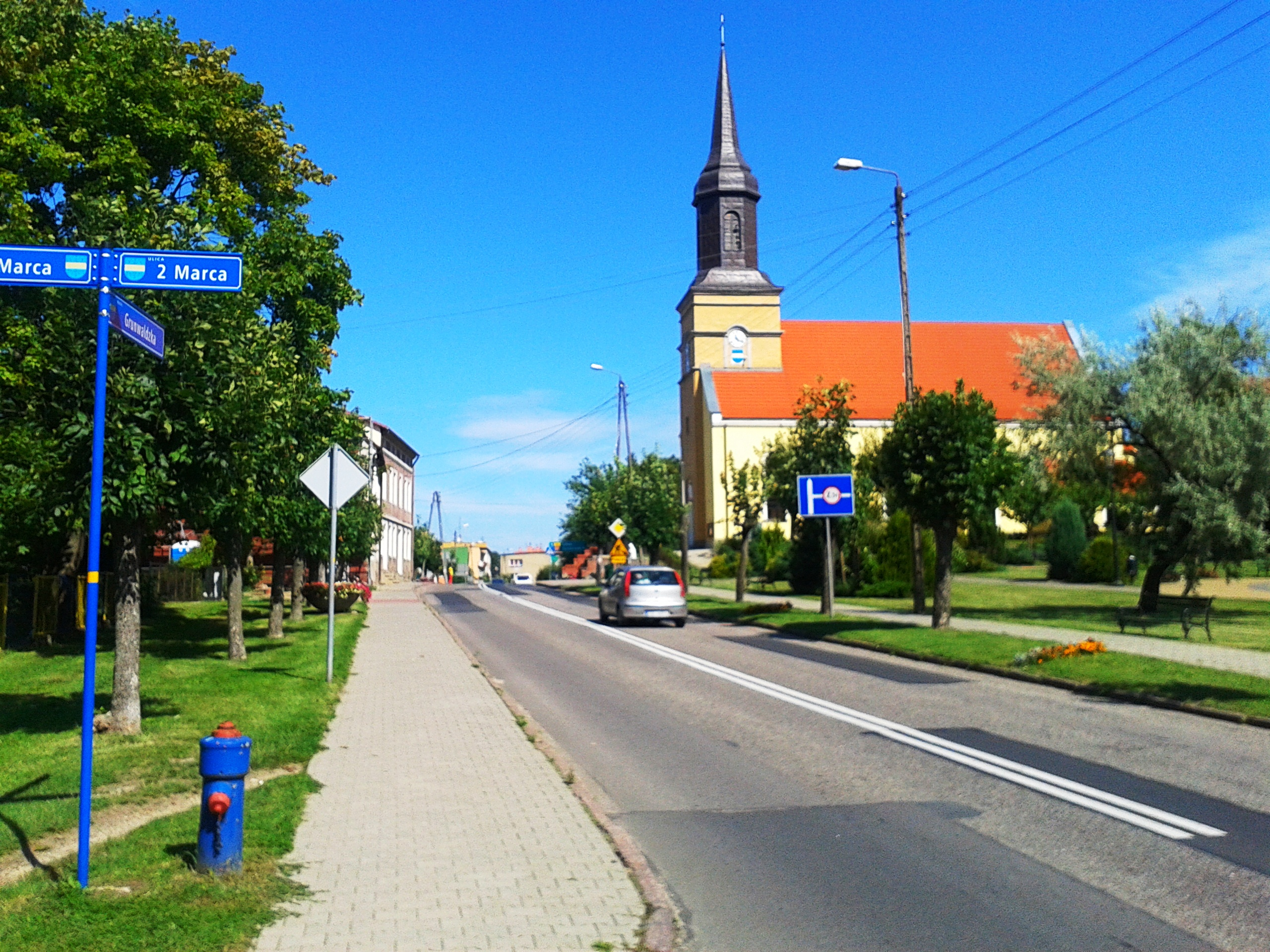 Węgorzyno - widok